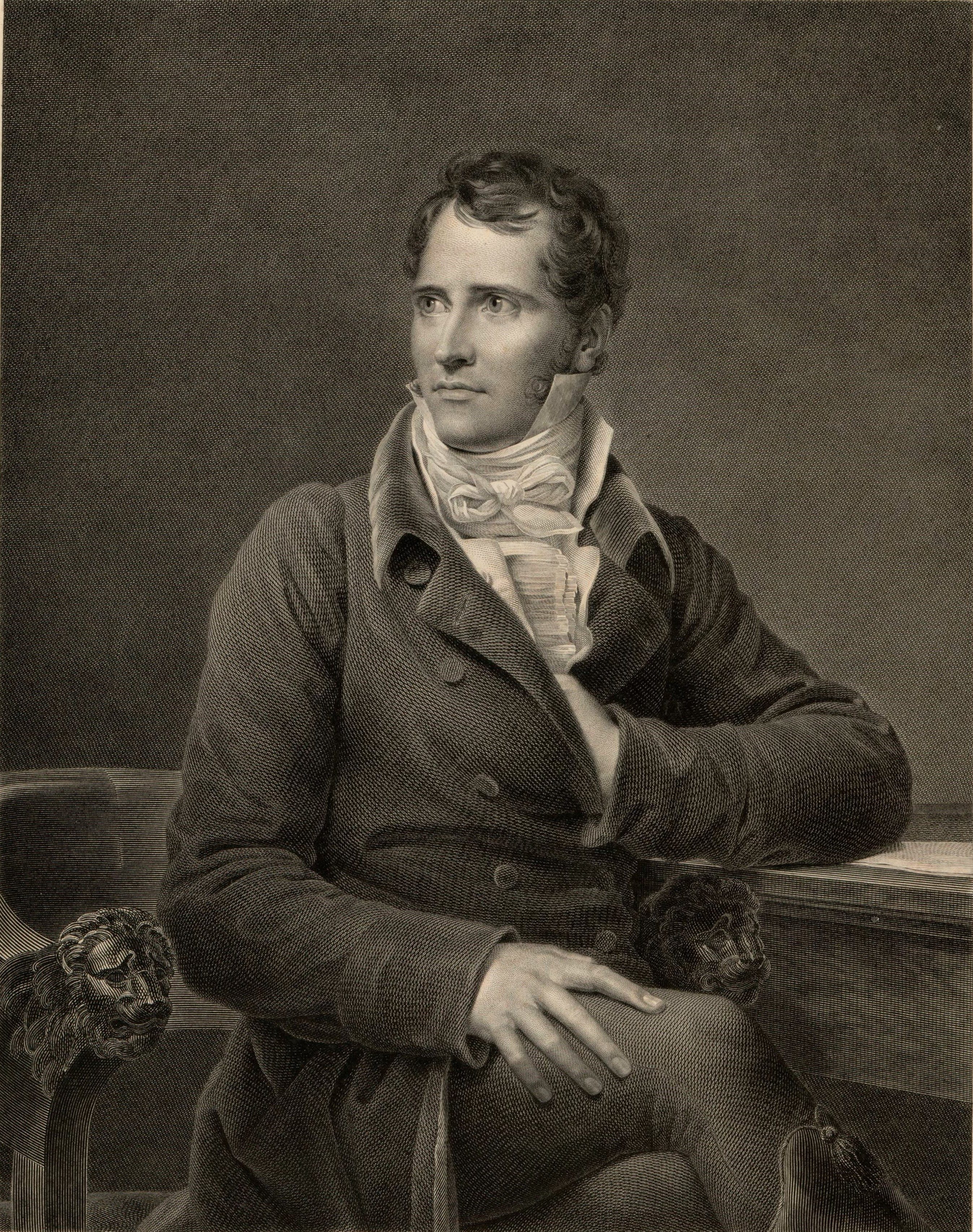 Elie Decazes